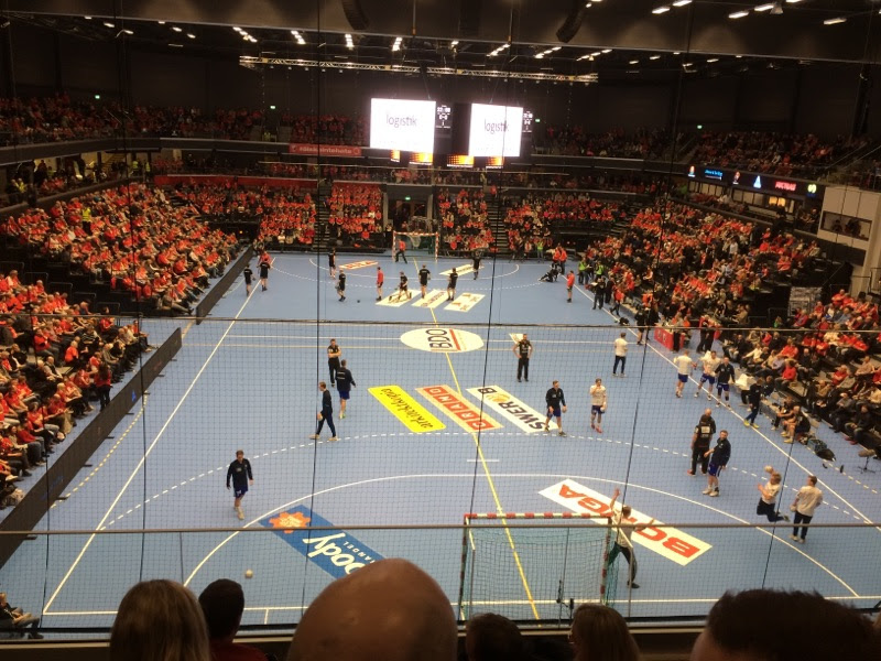 Bild från smygpremiären 6 april 2017 mellan Eskilstuna Guif och Ystad IF.